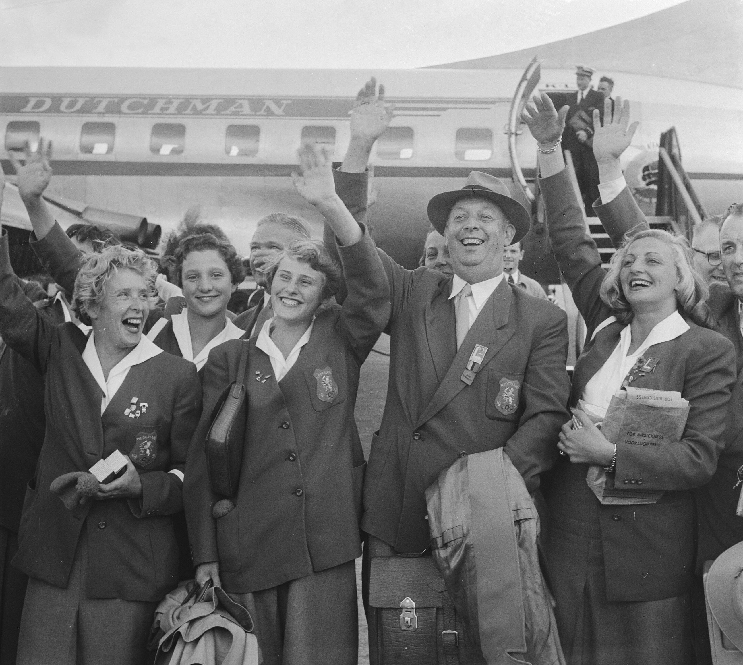 Collectie / Archief : Fotocollectie Anefo Reportage / Serie : [ onbekend ] Beschrijving : Aankomst Nederlandse zwemsters uit Helsinki. In het midden chef de mission Karel Lotsy, rechts van hem Geertje Wielema, links van hem Hannie Termeulen. Beide zwemsters wonnen in Helsinki een zilveren medaille. Datum : 4 augustus 1952 Locatie : Noord-Holland, Schiphol Trefwoorden : aankomsten, zwemmen Persoonsnaam : Lotsy, Karel, Termeulen, Hannie, Wielema, Geertje Fotograaf : Noske, J.D. / Anefo Auteursrechthebbende : Nationaal Archief Materiaalsoort : Negatief (zwart/wit) Nummer archiefinventaris : bekijk toegang 2.24.01.03 Bestanddeelnummer : 934-5421